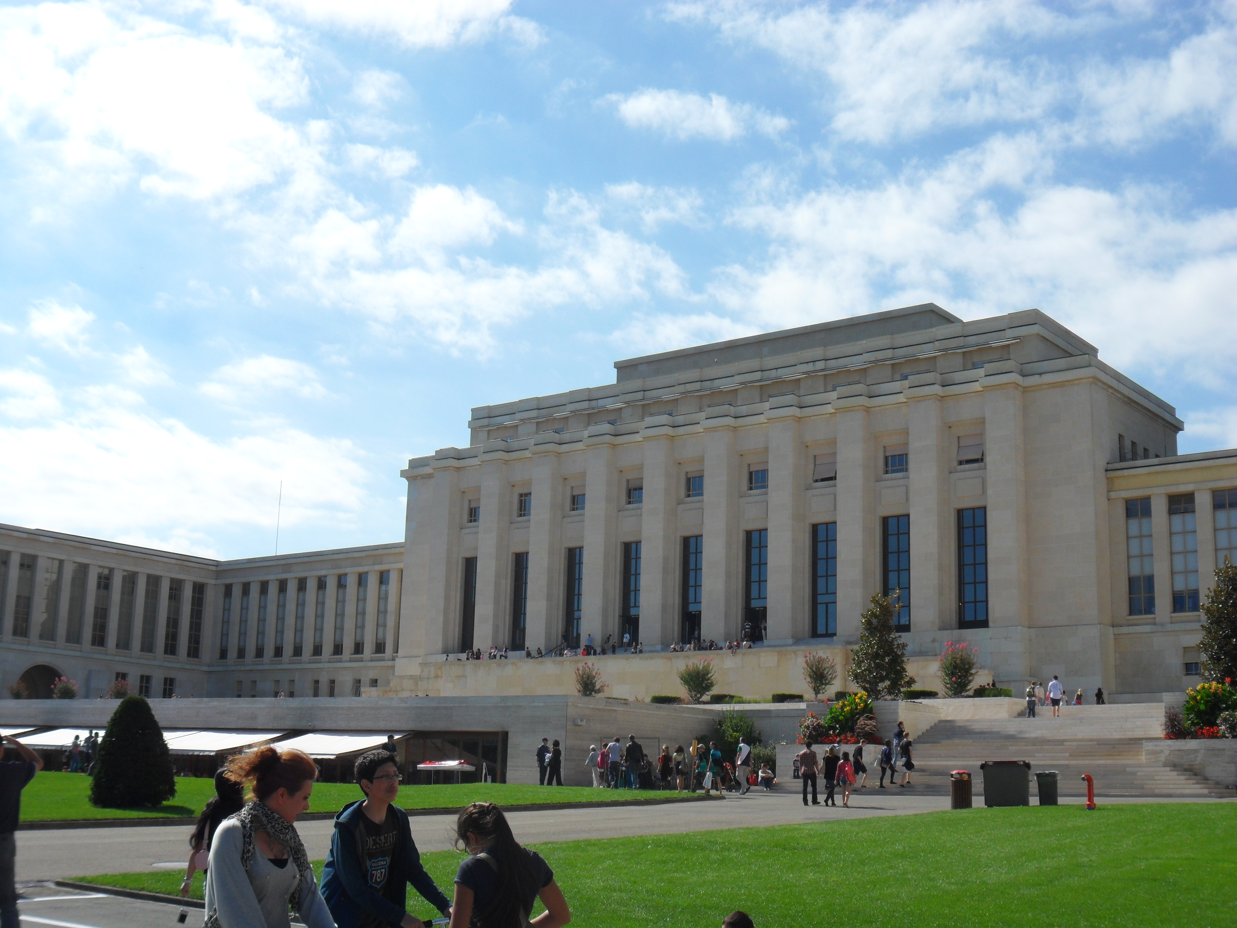 Bâtiment A du Palais des Nations en direction de l'ouest